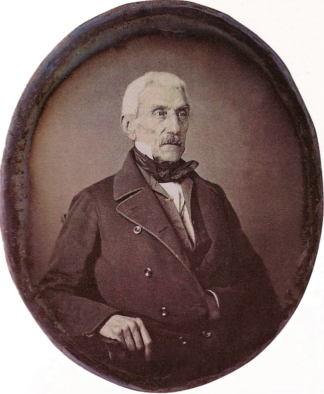 Daguerrotipo de San Martín tomado en París en 1848. Placa de cobre de 12 por 10 cm. Se trata de la única imagen fotográfica de José de San Martín (1778-1850), el original se encuentra en el Museo Histórico Nacional (Argentina).